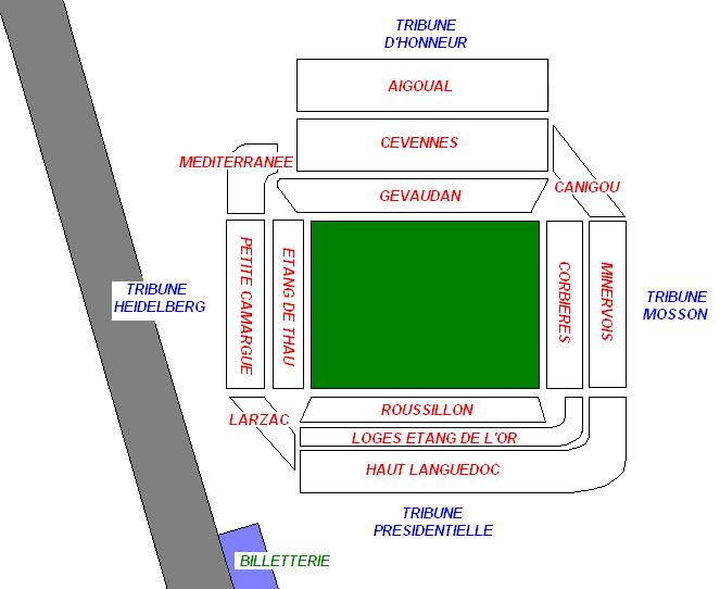 Emplacement des tribunes du stade de la Mosson